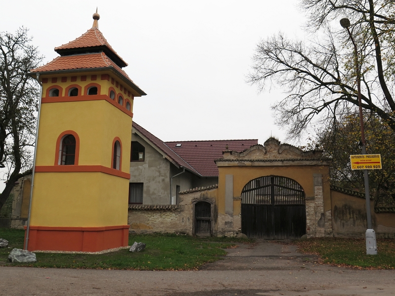 Brána usedlosti čp. 15, Kouty 15, Kouty (okres Nymburk).